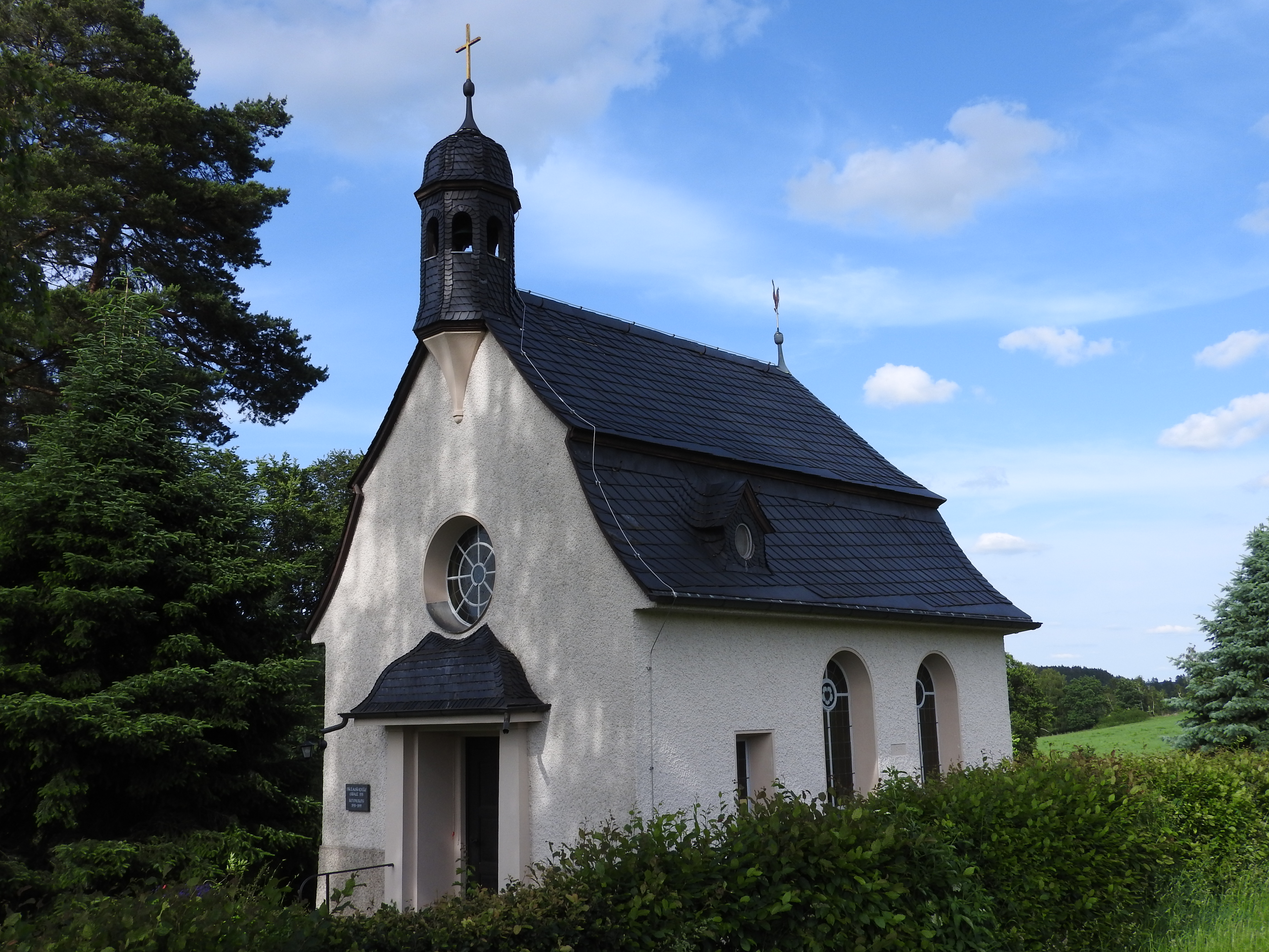 Nikolaus-Kapelle von Dörflas, Crispendorf in Thüringen